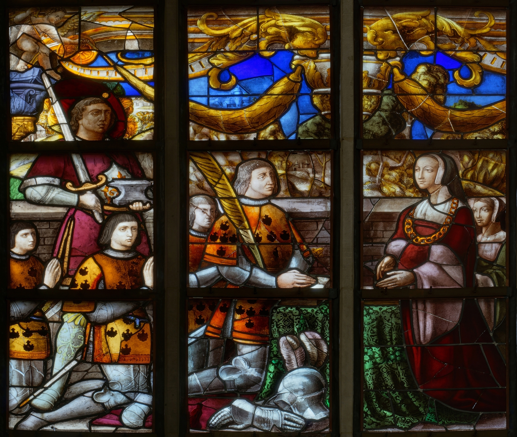 Sint-Leonarduskerk (Sint-Lenaarts). Detail van een glas-in-loodraam "De verrijzenis van Christus" (anno 1544). Men ziet de schenkers van het raam: links ridder Adriaan van der Noot en zijn drie zonen, rechts zijn echtgenote Josina Daens en hun dochter.